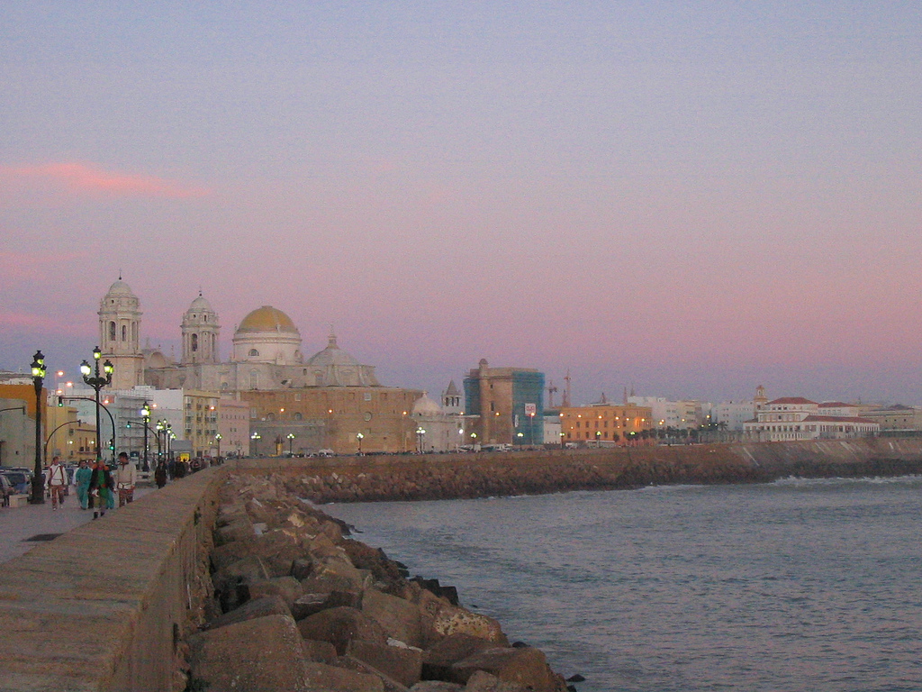 Vista de Cádiz (Andalucía, España) al atardecer